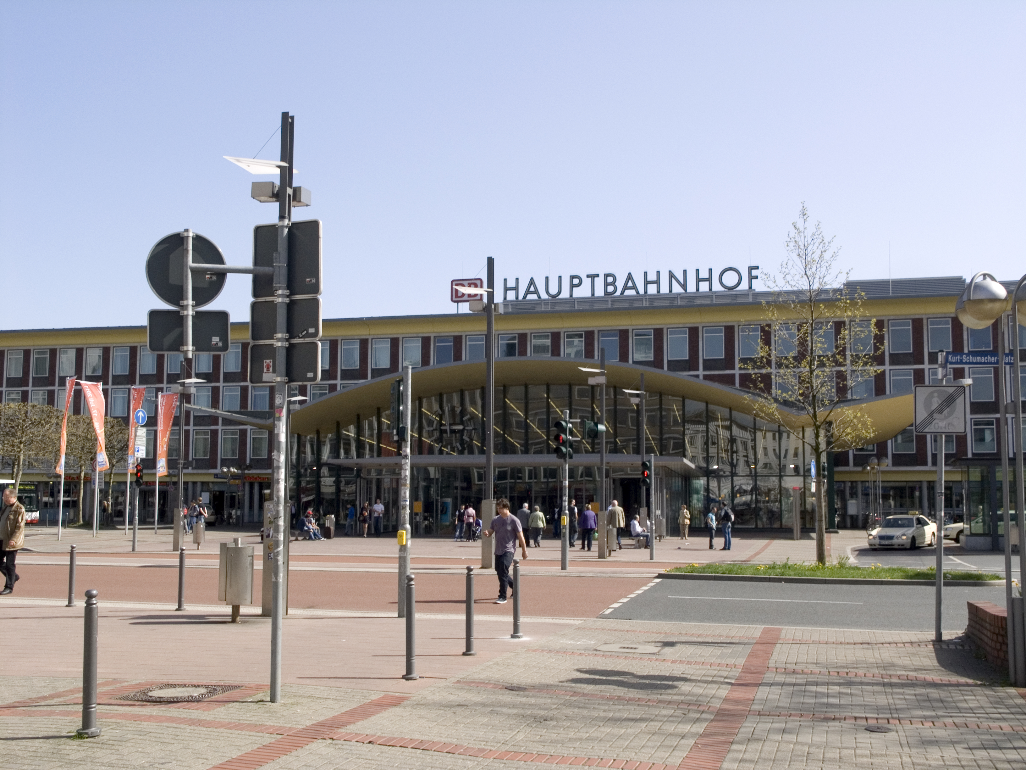 Северный Рейн - Вестфалия, Бохум. Главный вокзал